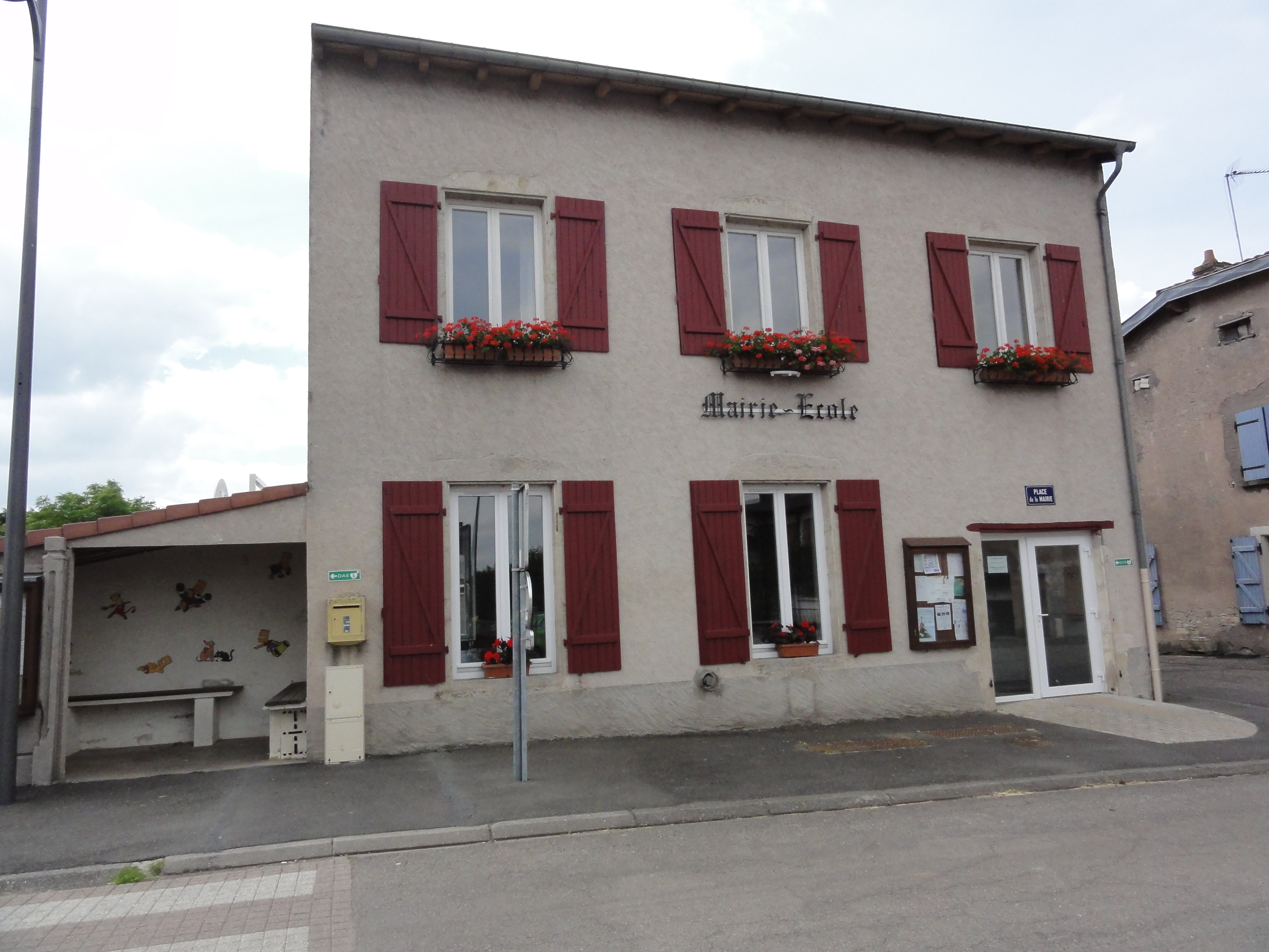 Brémoncourt (M-et-M) mairie - école